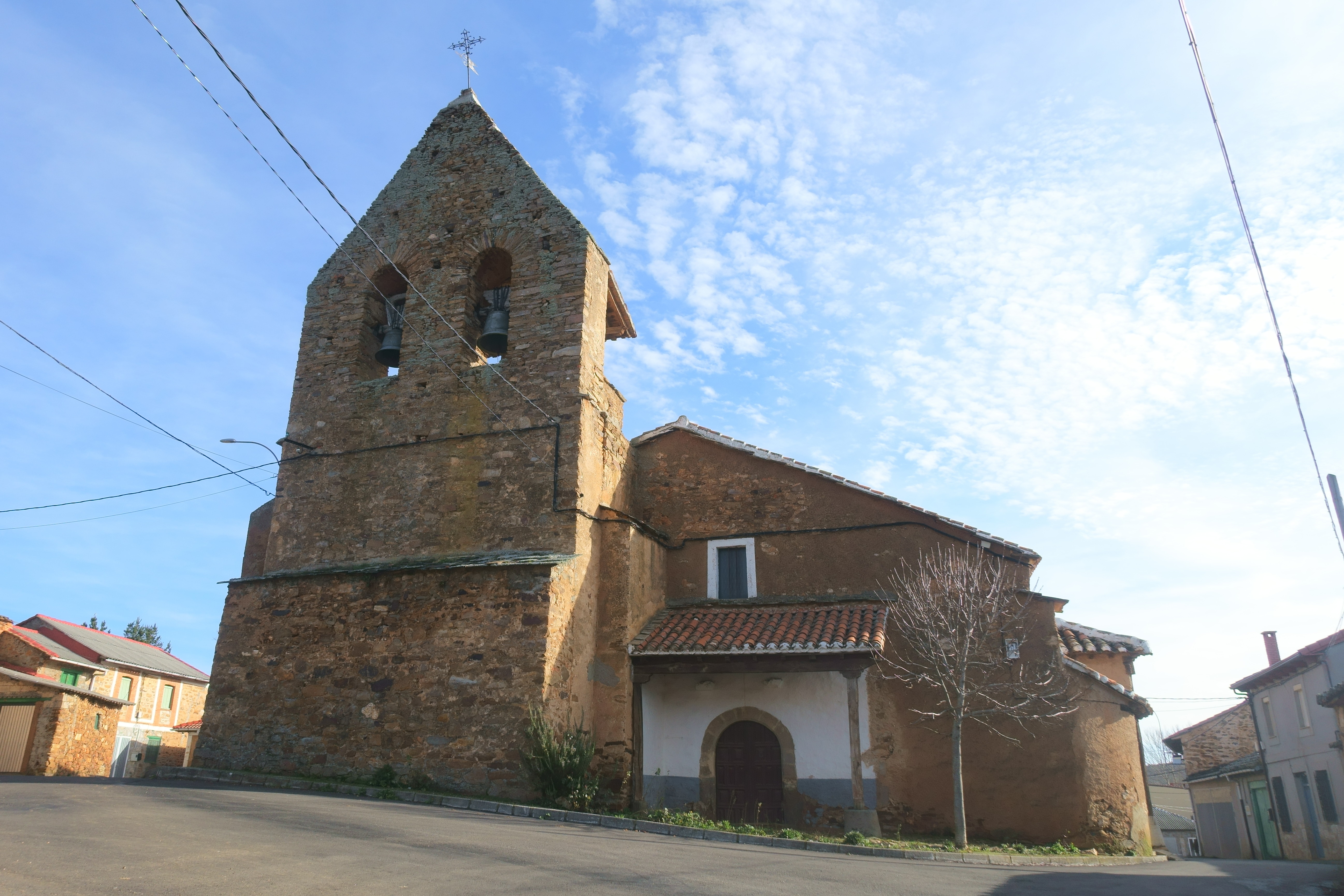 Iglesia de Santiago Apóstol, Brazuelo (León, España).